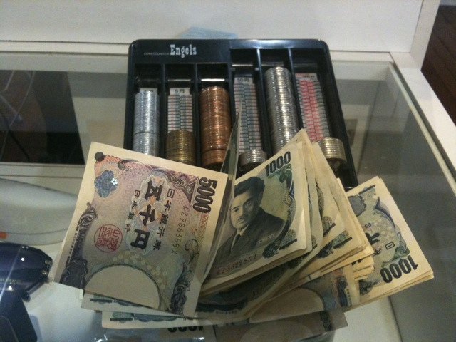 proof東北大地震義援金